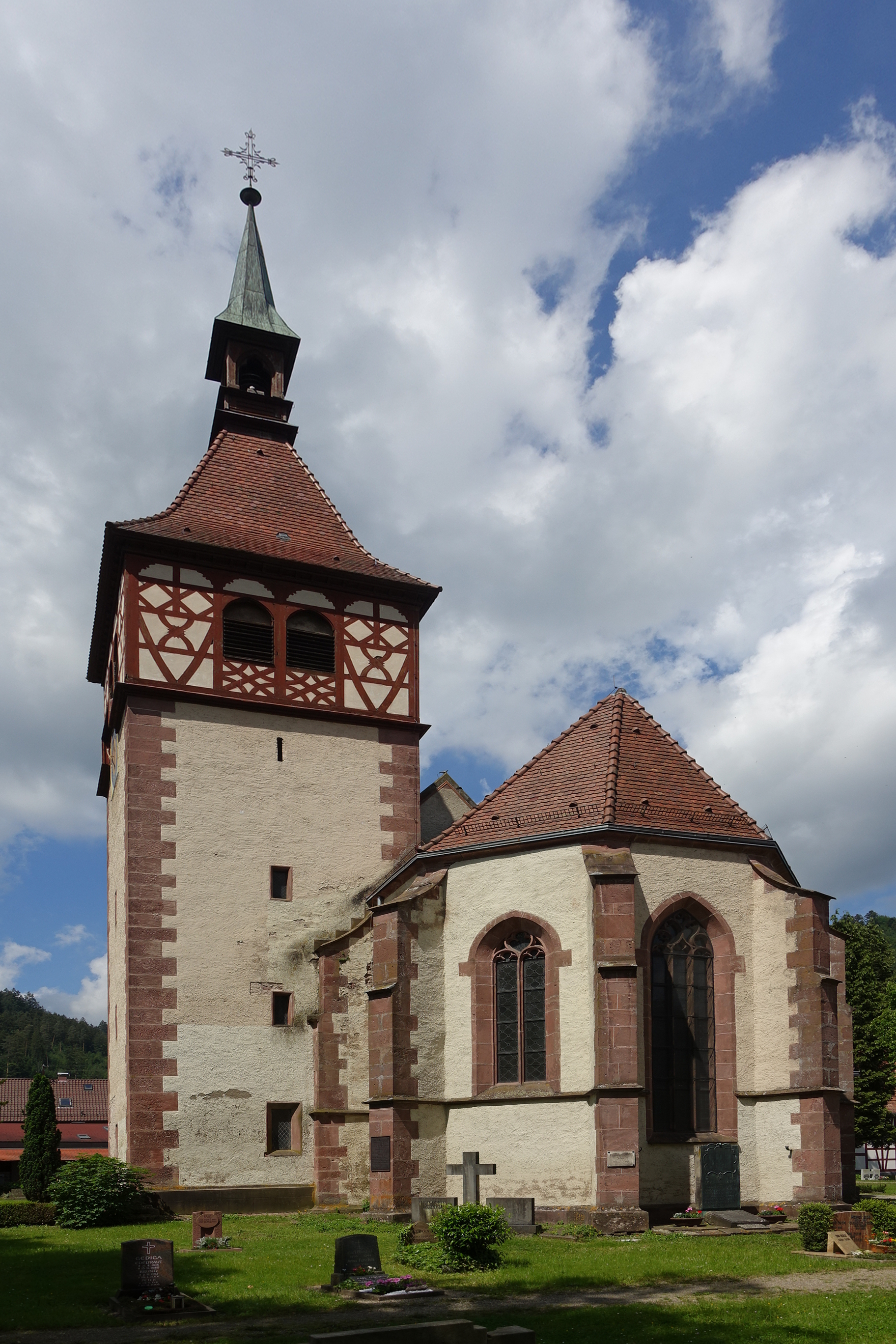 Apsis der Kirche